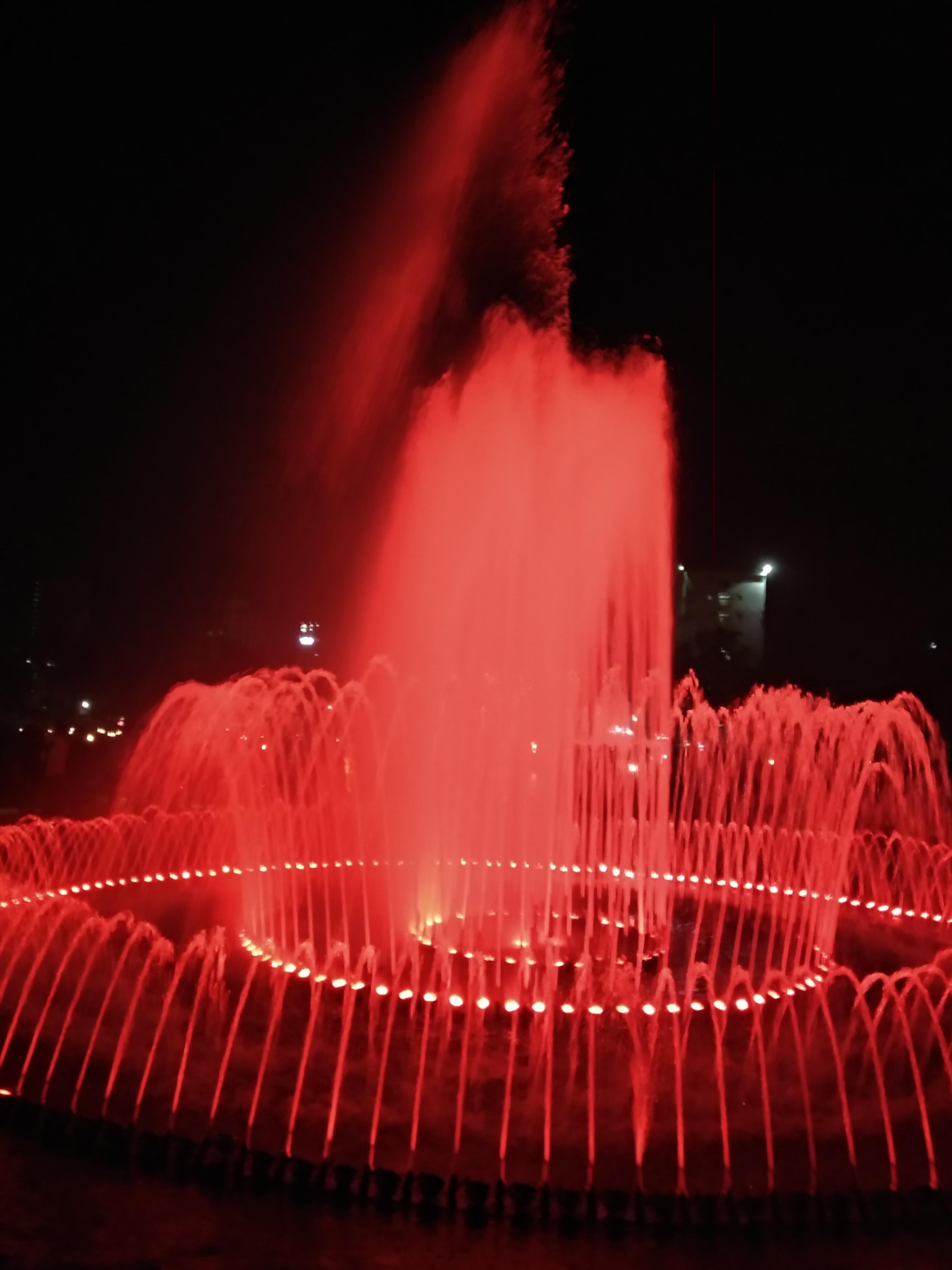 আগ্রাবাদ জাম্বুরী পার্কের লাল রংয়ের ফোয়ারা।